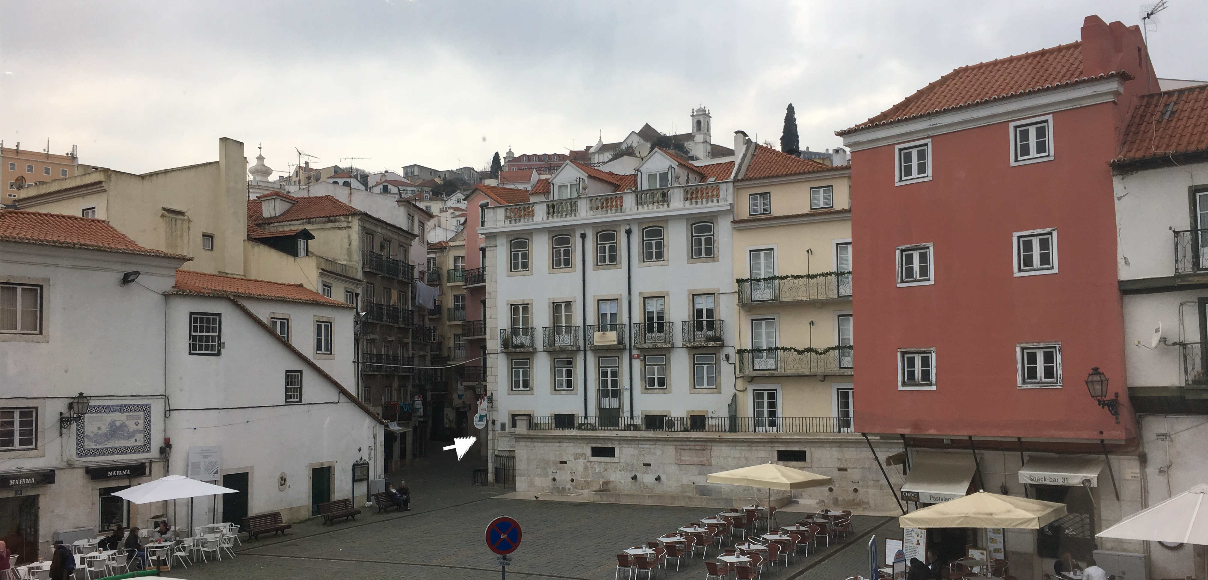 Localização do Ex-Solar dos Santos e actual Lautascos